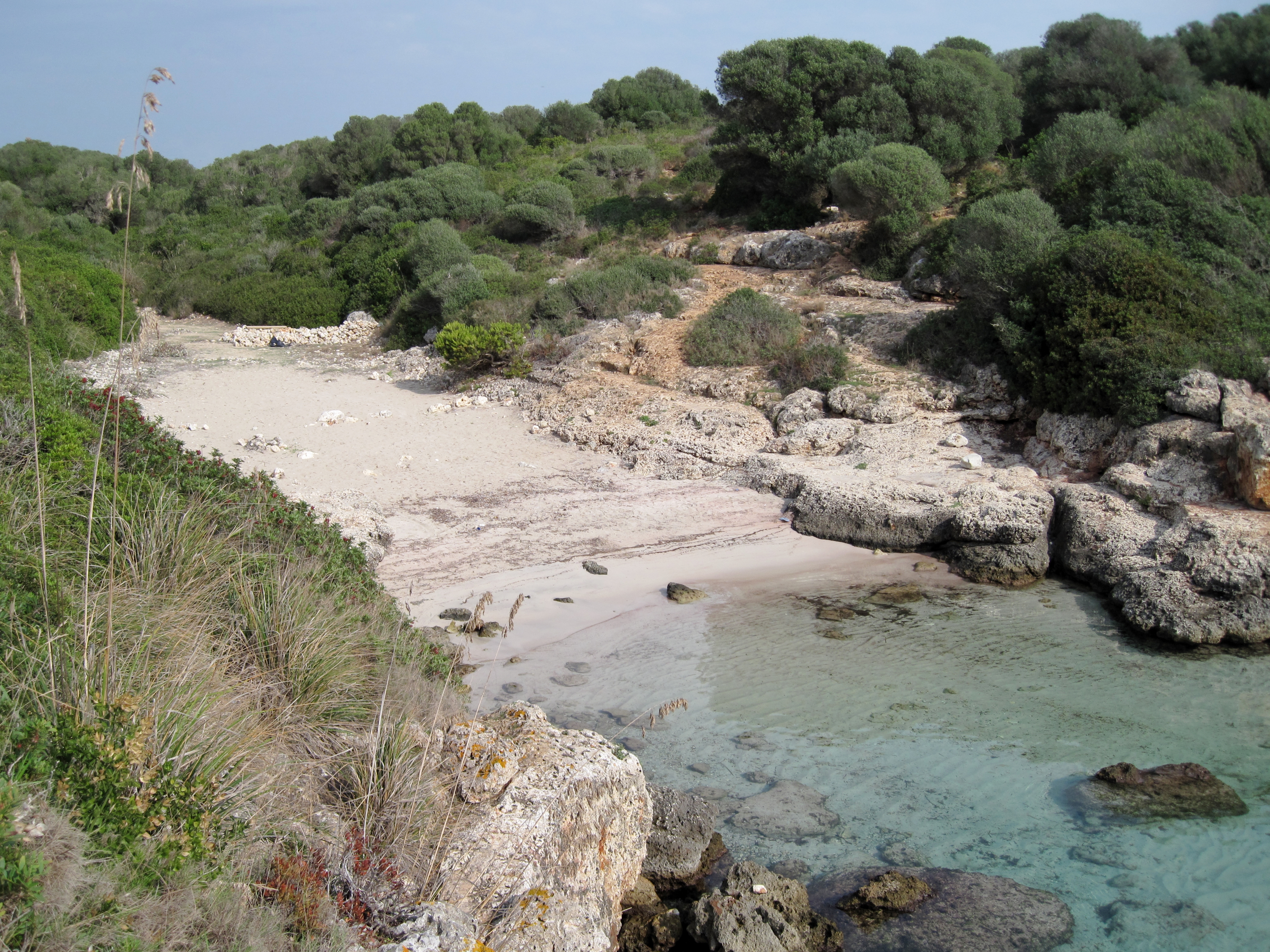 Cala Petita, kleine Bucht nahe Porto Cristo an der Küste der Gemeinde Manacor, Mallorca, Spanien